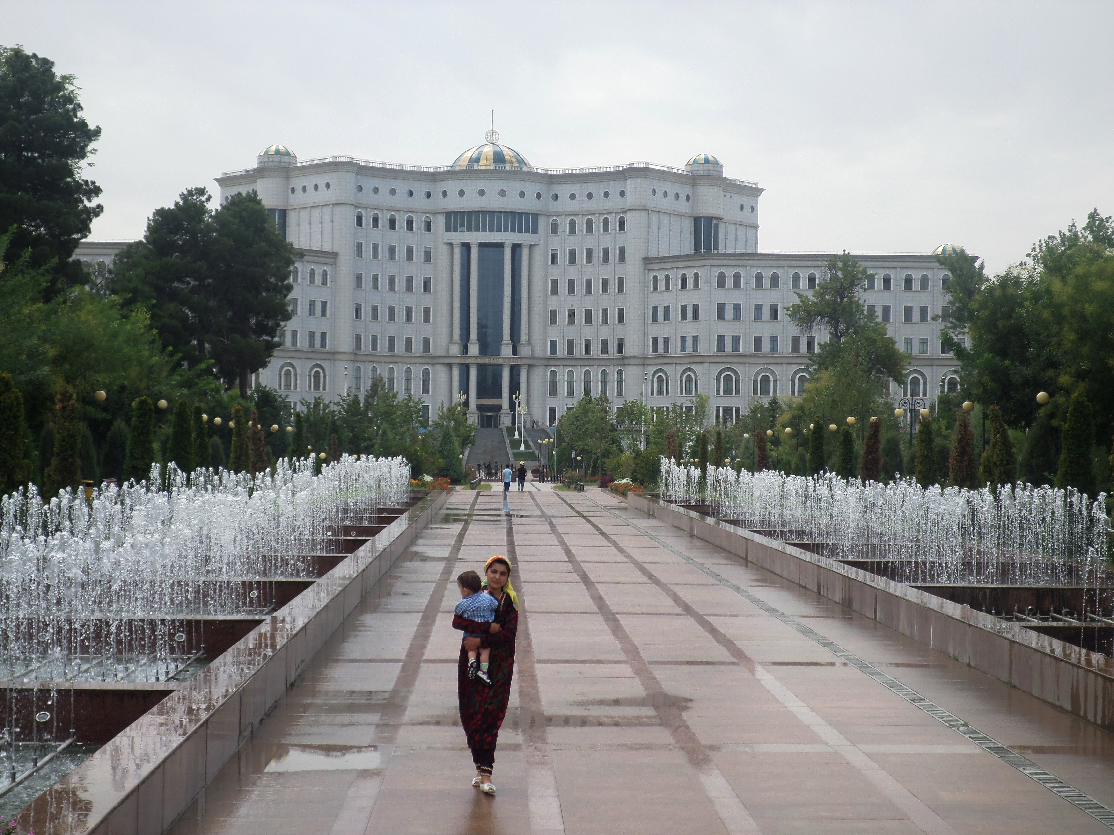 Здание Национальной библиотеки с прилегающим бульваром. Душанбе 2015 год.